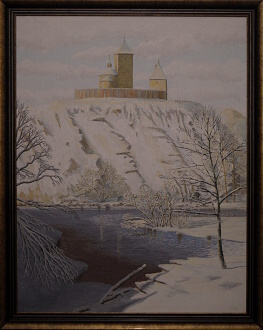 Hrad Týnec nad Sázavou, olej na plátně 110x86 cm